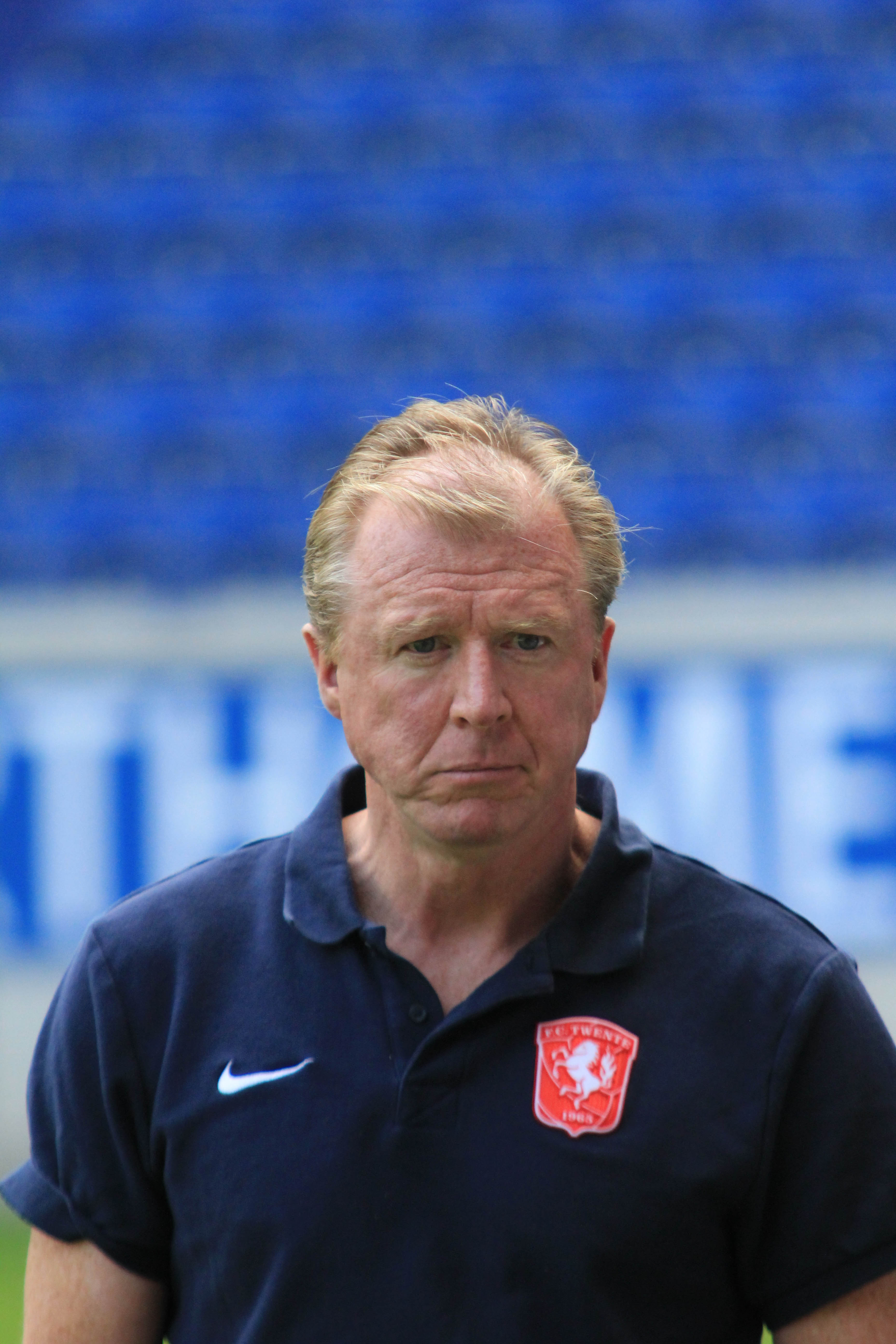 FC Twente Enschede